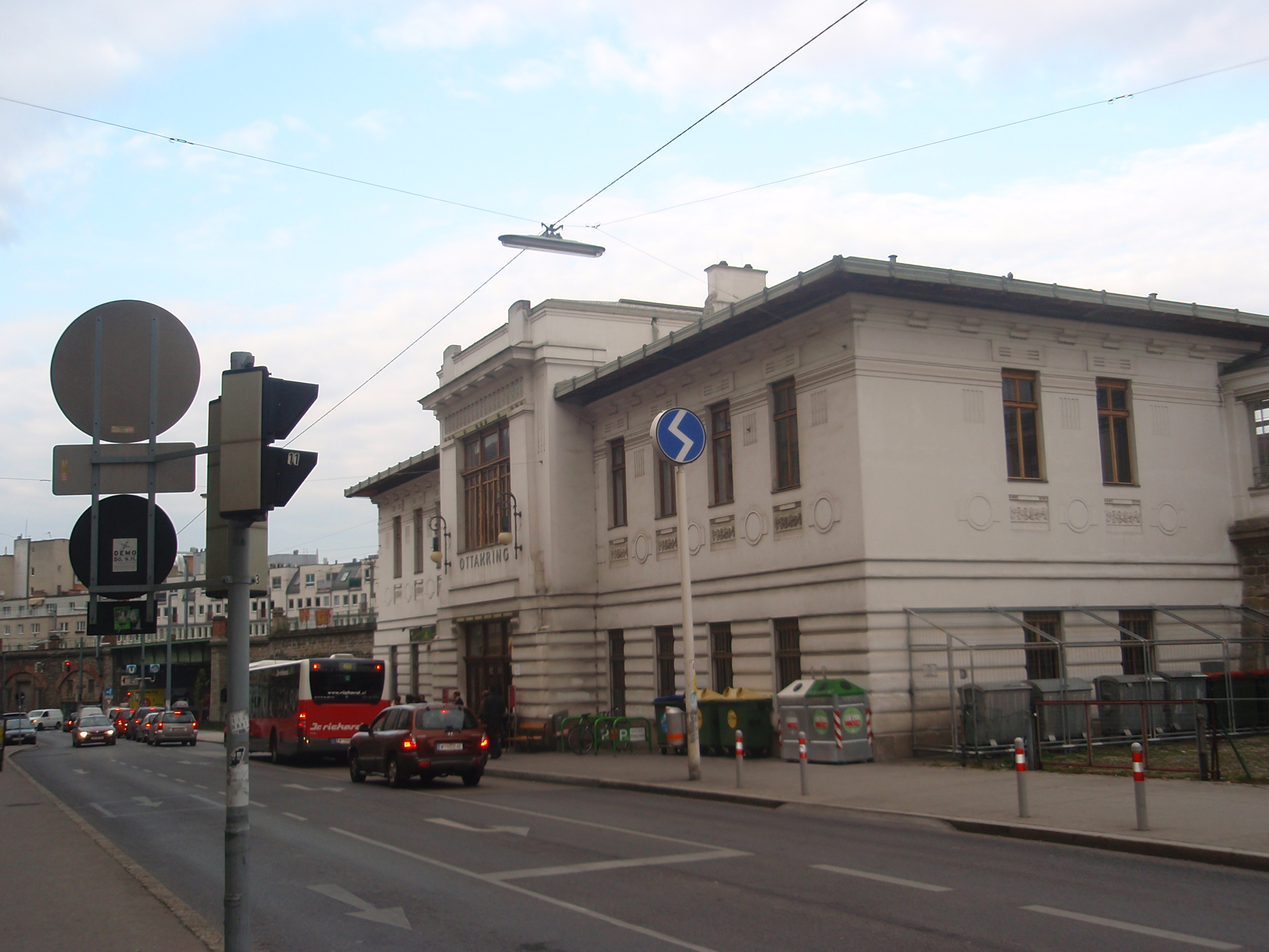 Bahnhof Ottakring